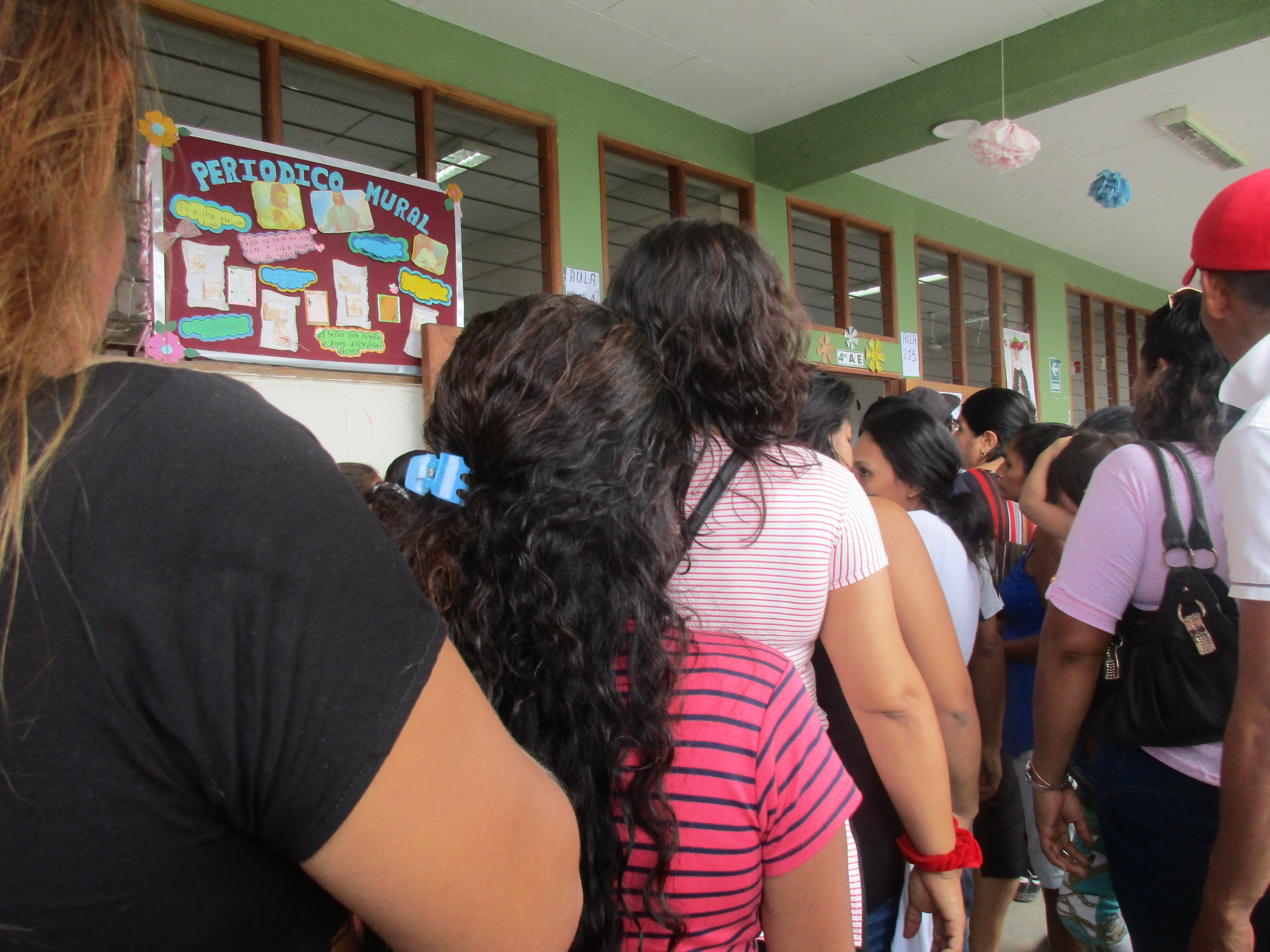 Votantes haciendo su cola para votar en las elecciones regionales y municipales de Loreto 2018 en Iquitos